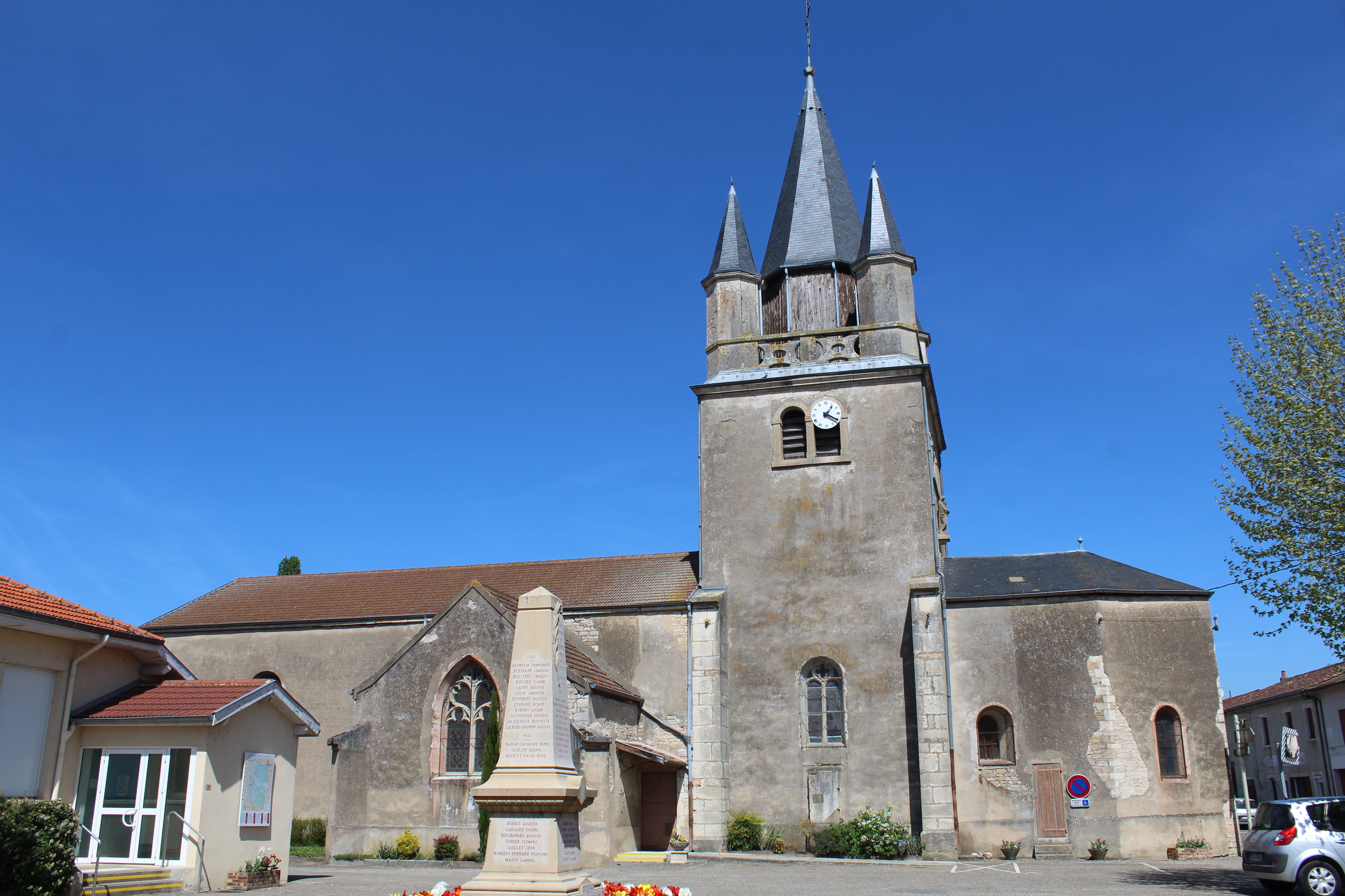 Église Saints Pierre et Paul de Sermoyer.